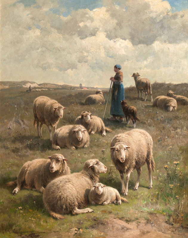 Schafe in den Dünen. Öl/Lw., 80 x 64 cm, l. u. sign. C. van Leemputten, auf dem Rahmen Adressetikett des Künstlers mit Titel 'Moutons dans les dunes'